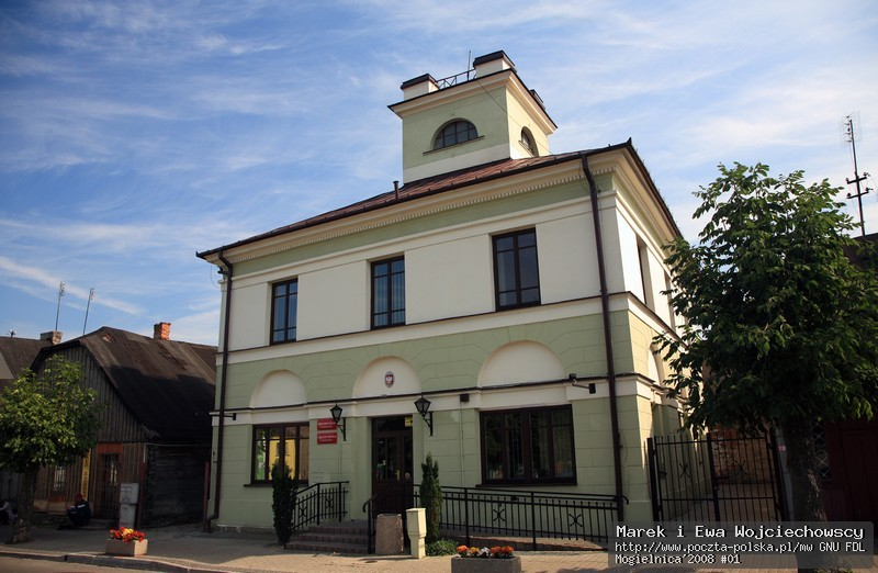 Urząd w Mogielnicy